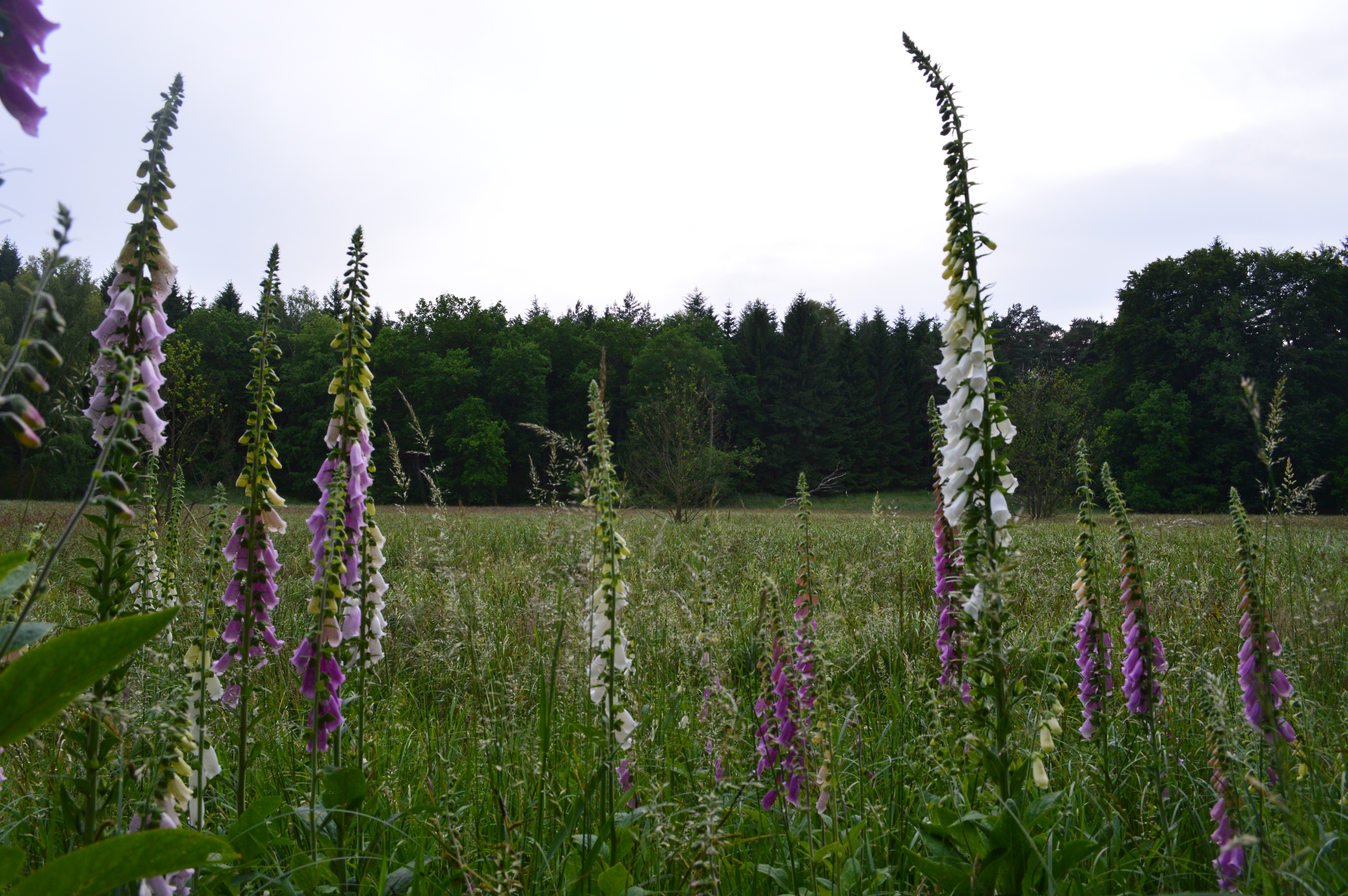 Fingerhut am Rand der Feuchtwiese, Naturschutzgebiet Zerweliner Koppel, Brandenburg